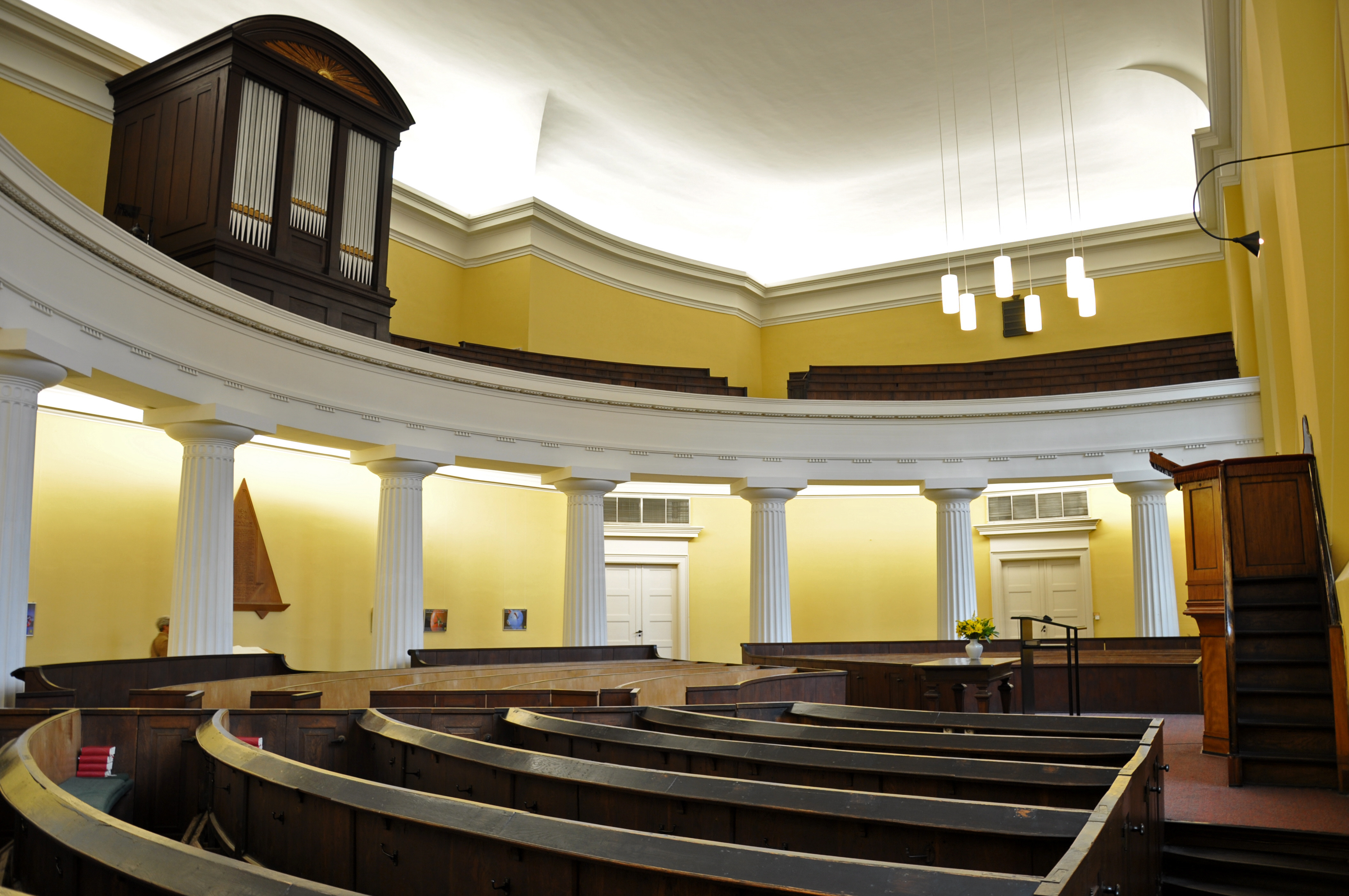 Orgel in Lübeck, Reformierte Kirche